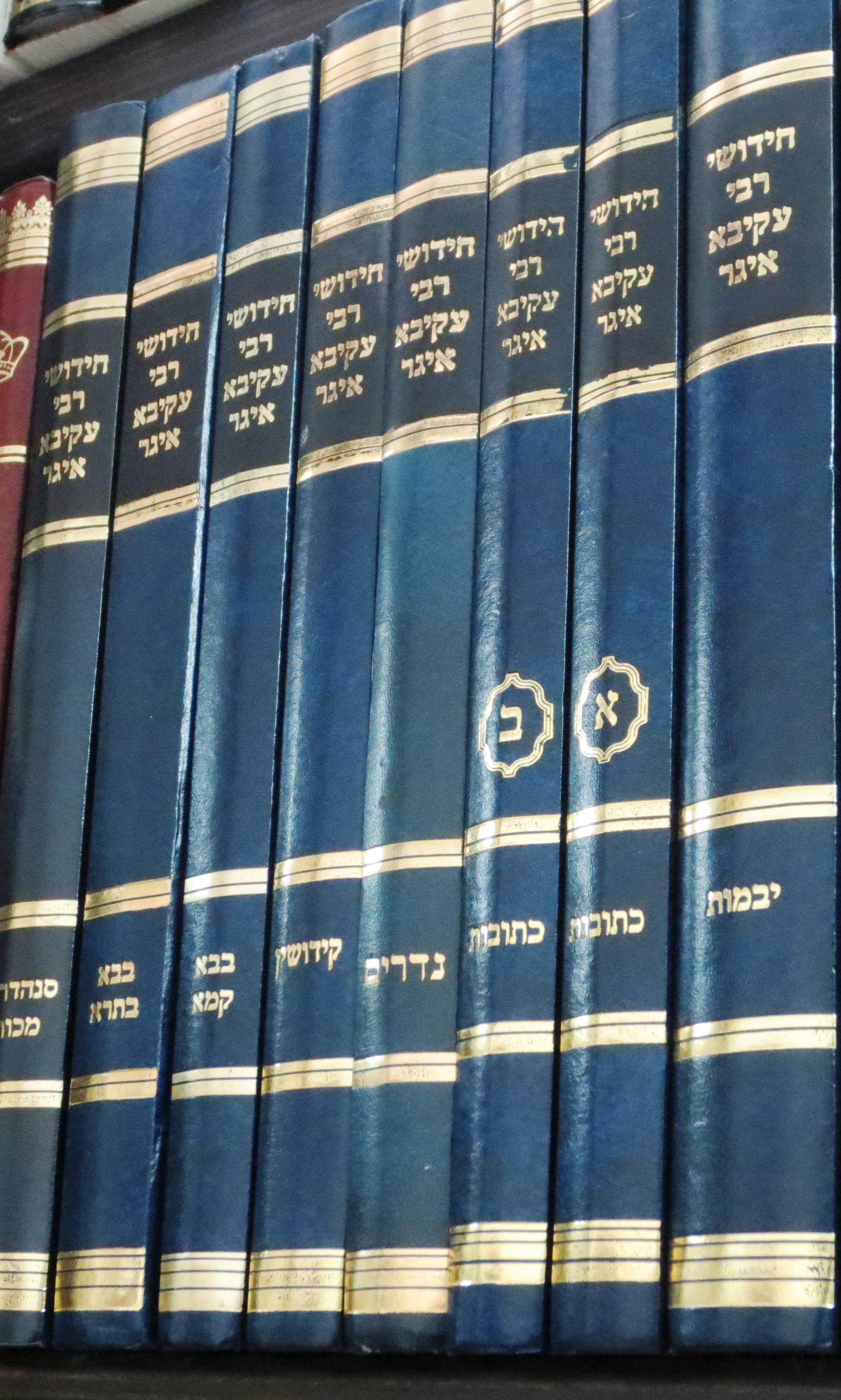 חידושי רבי עקיבא איגר, "הכחולים", מהדורת אריאלי